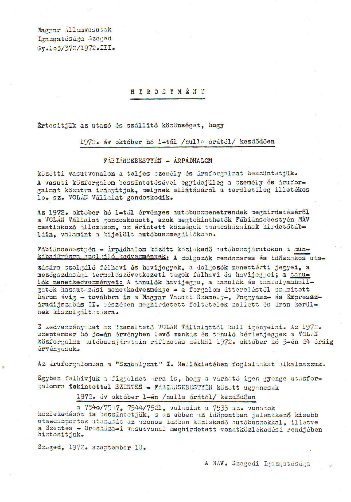 Hirdetmény a Fábiánsebestyén–Árpádhalom-vasútvonal megszüntetéséről.